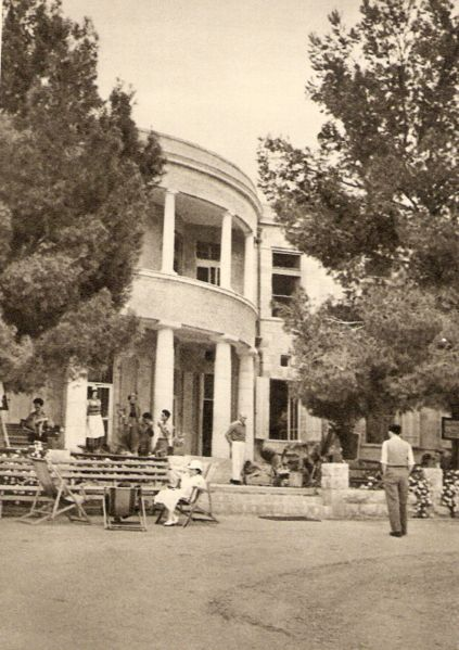 בית ההבראה במוצא, 1934 לערך Source:Das Palästina Bilder-Buch, E.P. Tal & co./Verlag Wien, 1934